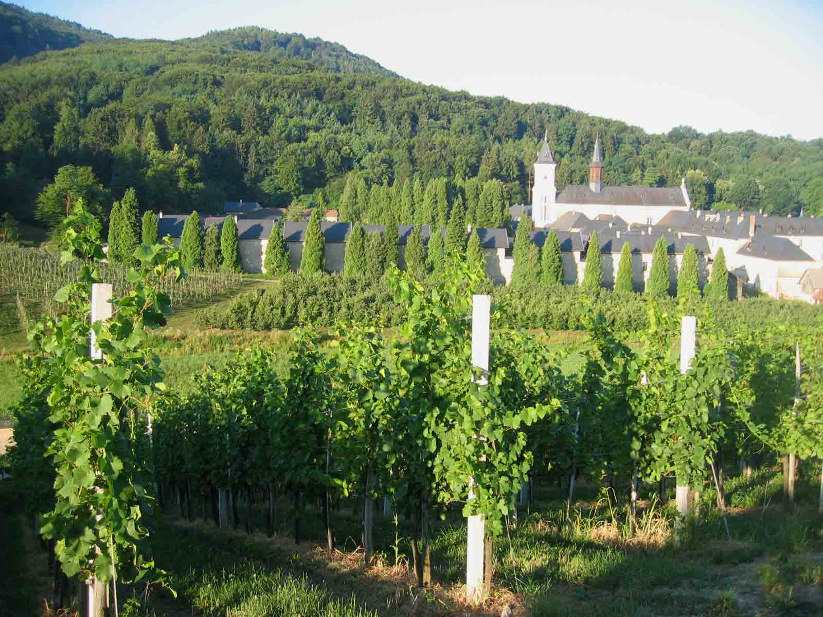 Pleterje, monastery in Slovenia photo:Ziga 08:08, 2 April 2007 (UTC)